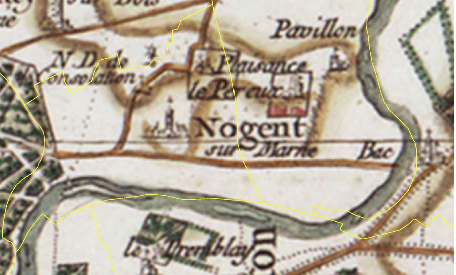 Détail de carte réalisée par César-François Cassini et figurant la commune de Nogent-sur-Marne.